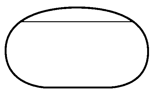 Mapa do Iowa Speedway